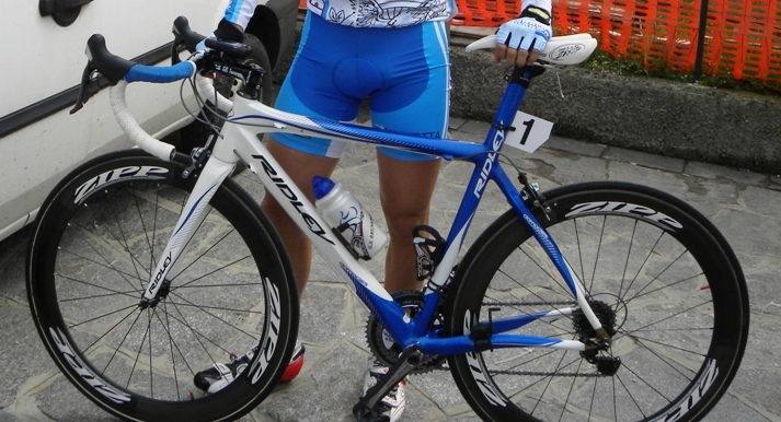 Bici Ridley 2009 del ciclista Maurizio Gorato della squadra Brunero